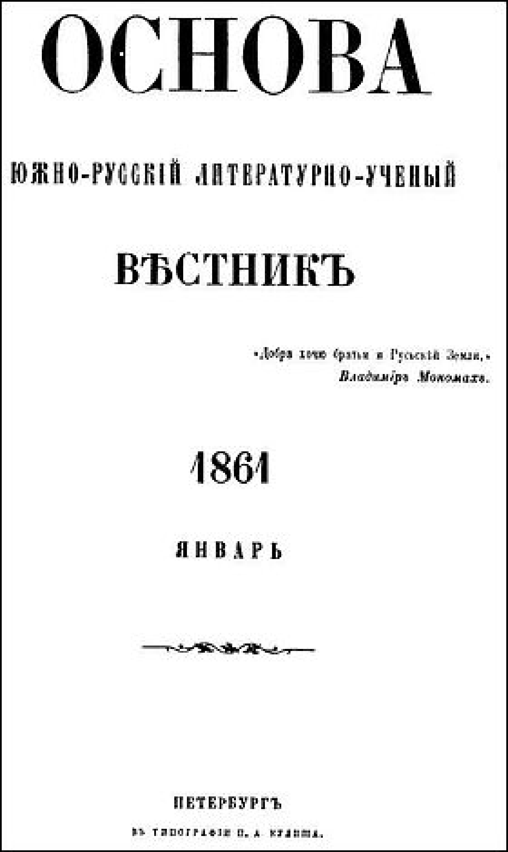 фото титульної сторінки часопису "Основа"